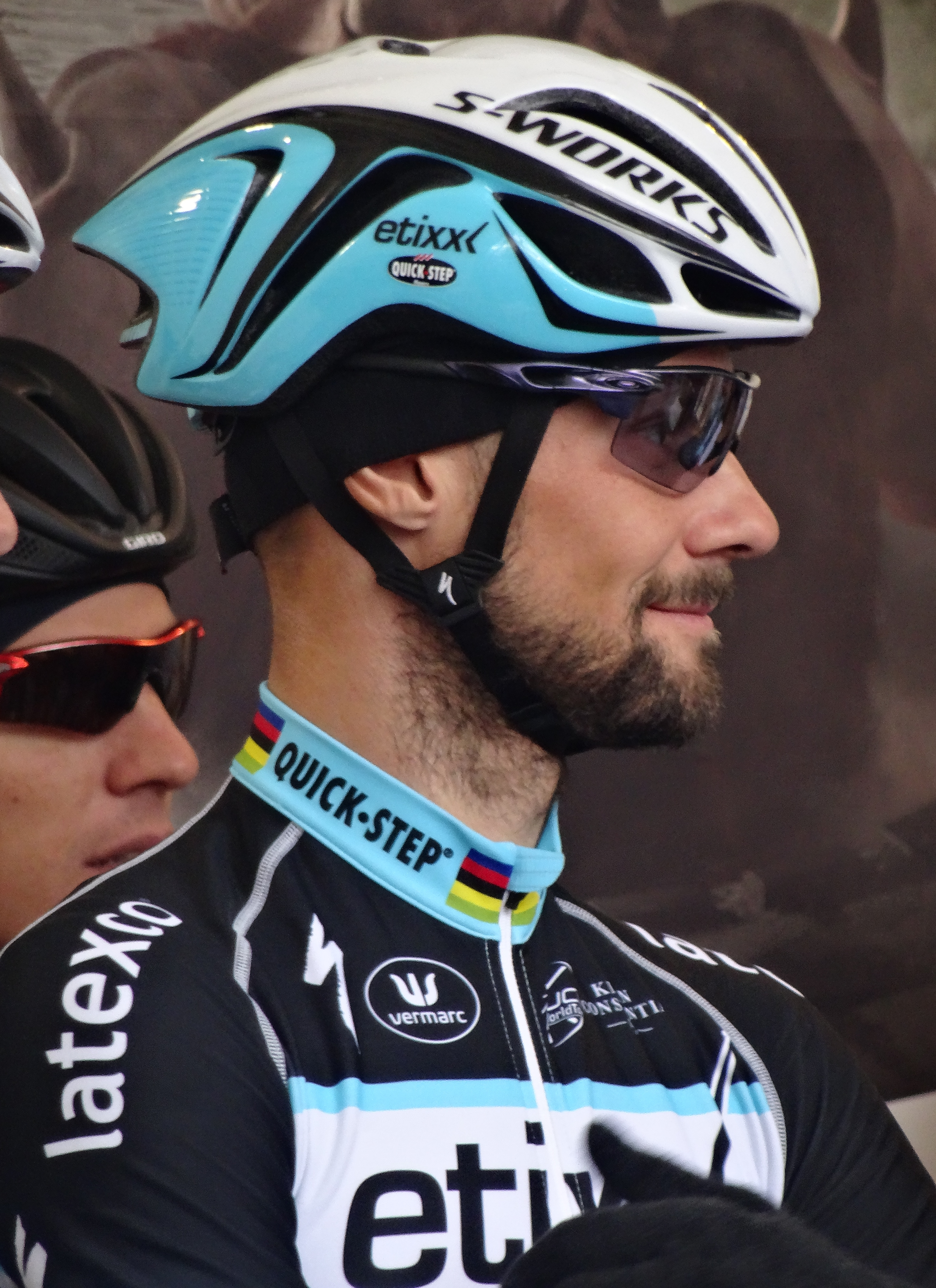 Reportage réalisé le dimanche 1er mars à l'occasion du départ et de l'arrivée de Kuurne-Bruxelles-Kuurne 2015 à Kuurne, Belgique.